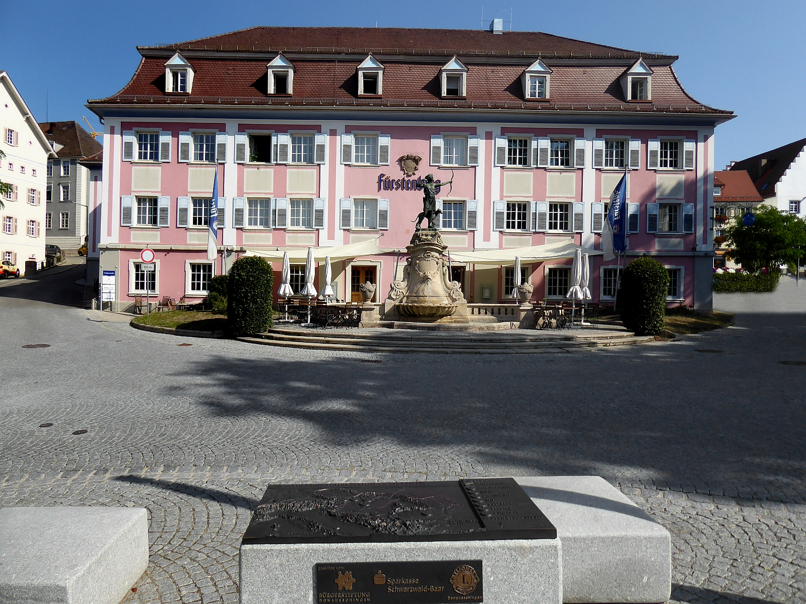 Fürstenberg Bräustüble in Donaueschingen